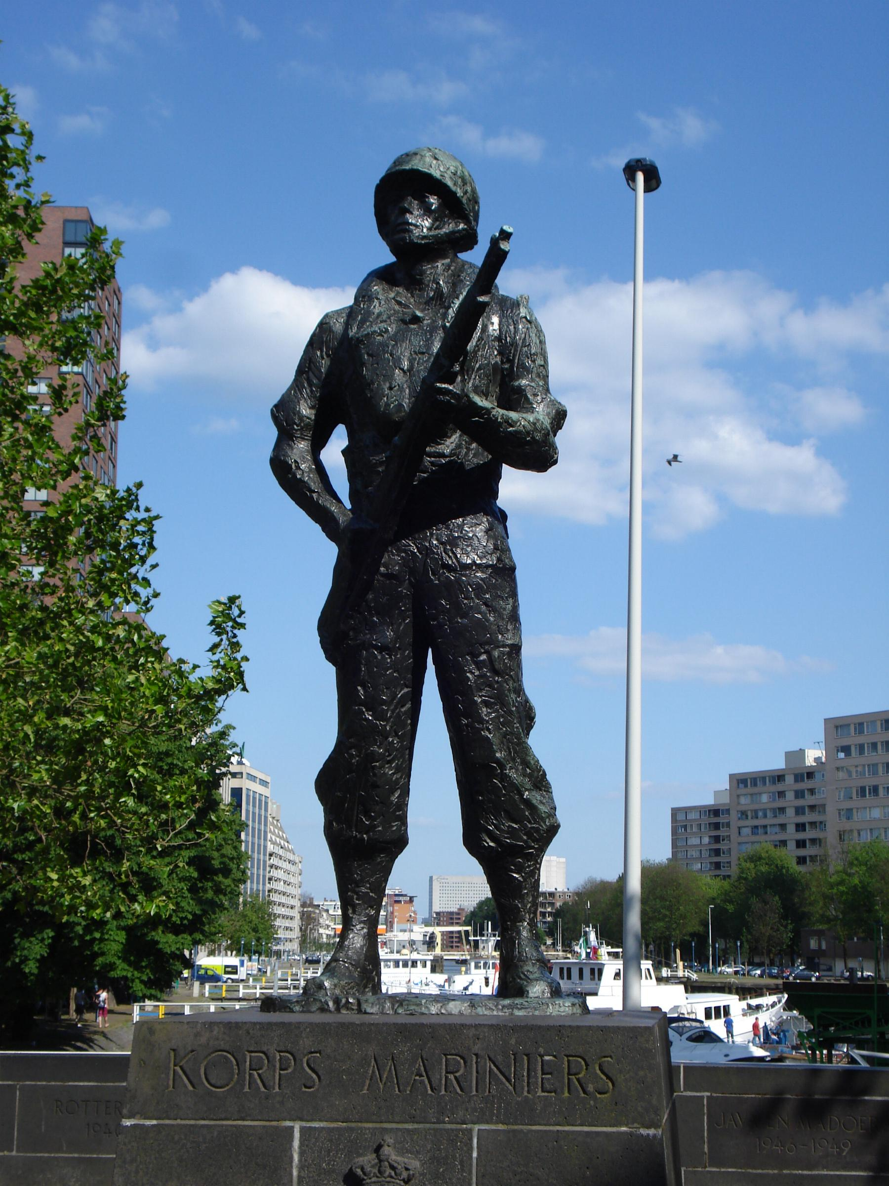 Rotterdam, Oostplein. Kunstwerk "Mariniersmonument" van Titus Leeser. Rotterdam/The Netherlands.